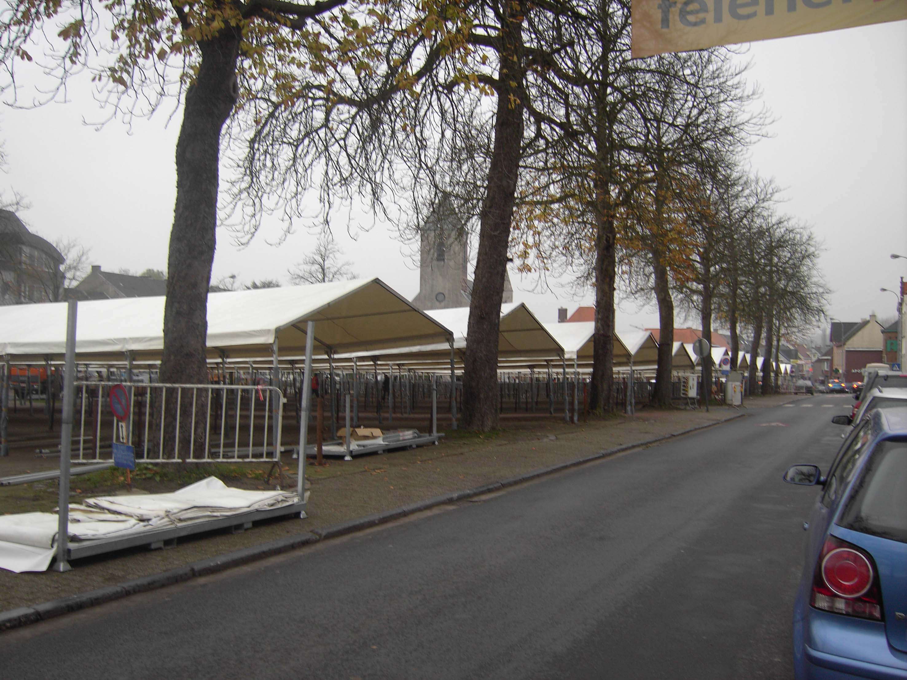 Sint-Lievenshoutem - Oost-Vlaanderen - België - de jaarmarkt van 2008 in opbouw.